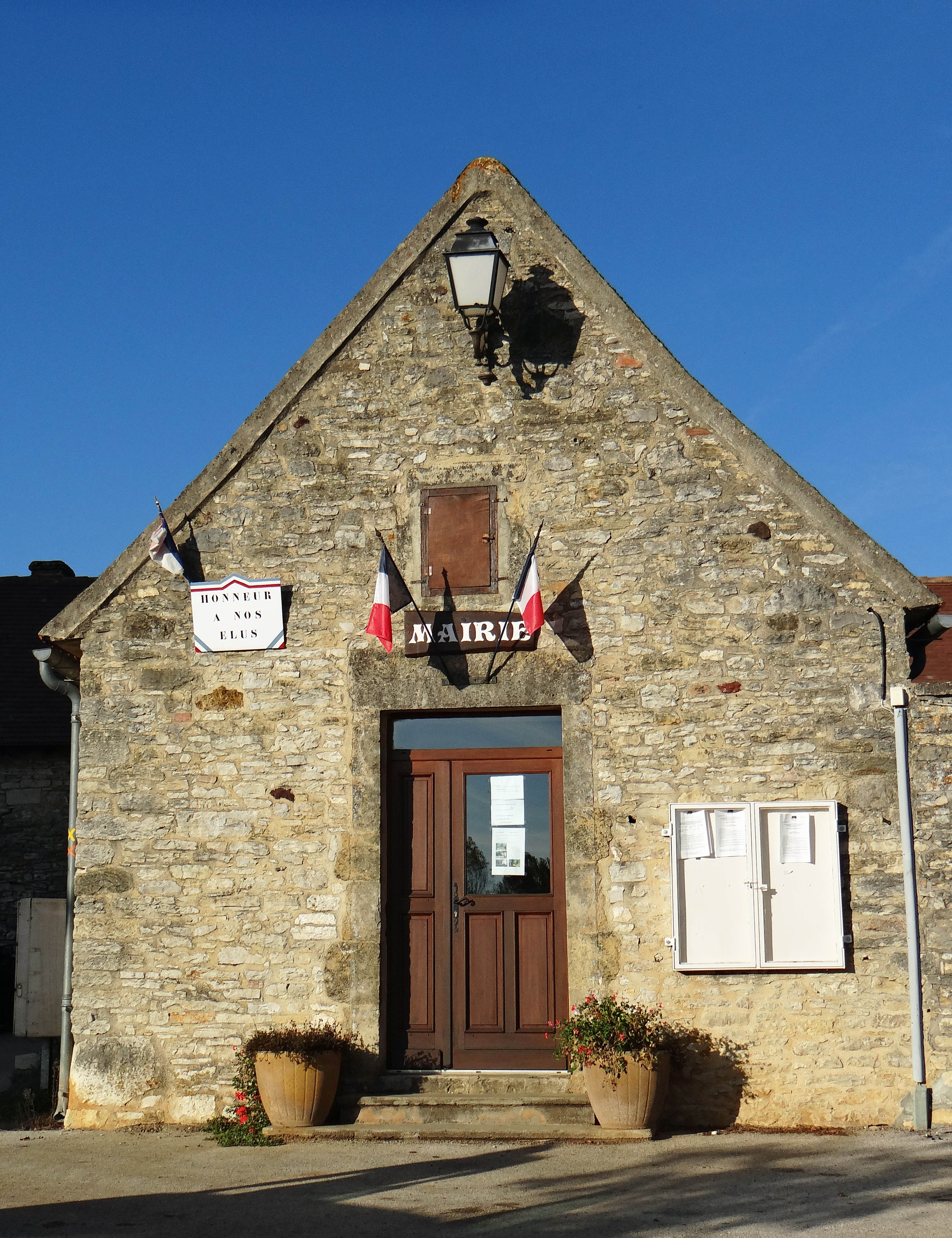 Rampoux - Mairie